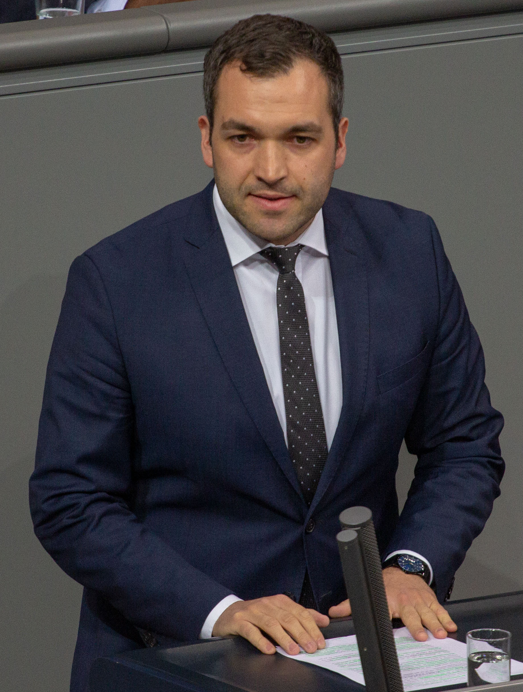 Konstantin Kuhle, Mitglied des Deutschen Bundestages, während einer Plenarsitzung am 11. April 2019 in Berlin.